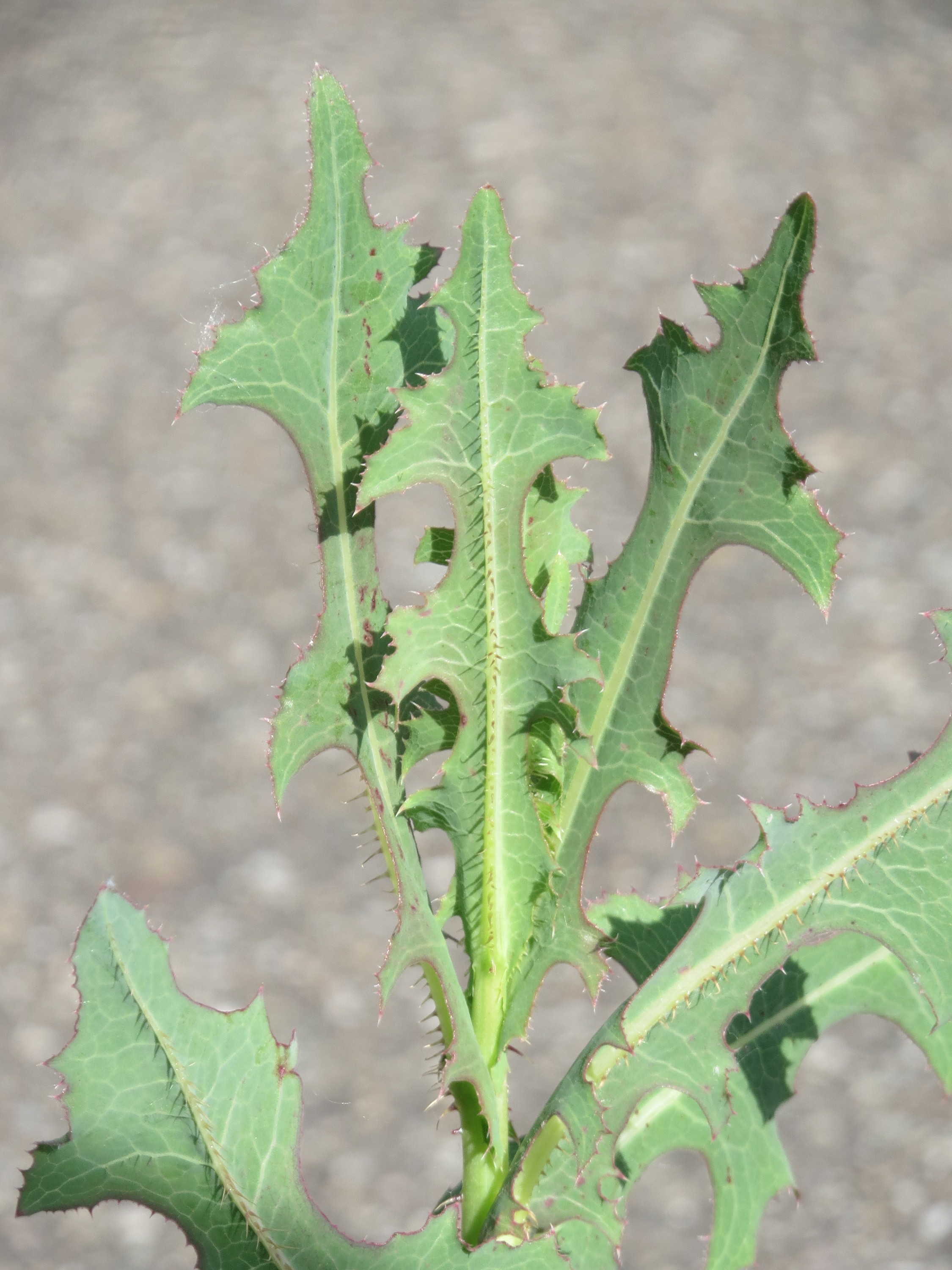 Ritzenbotanik: Stachel-Lattich (Lactuca serriola) in Hockenheim